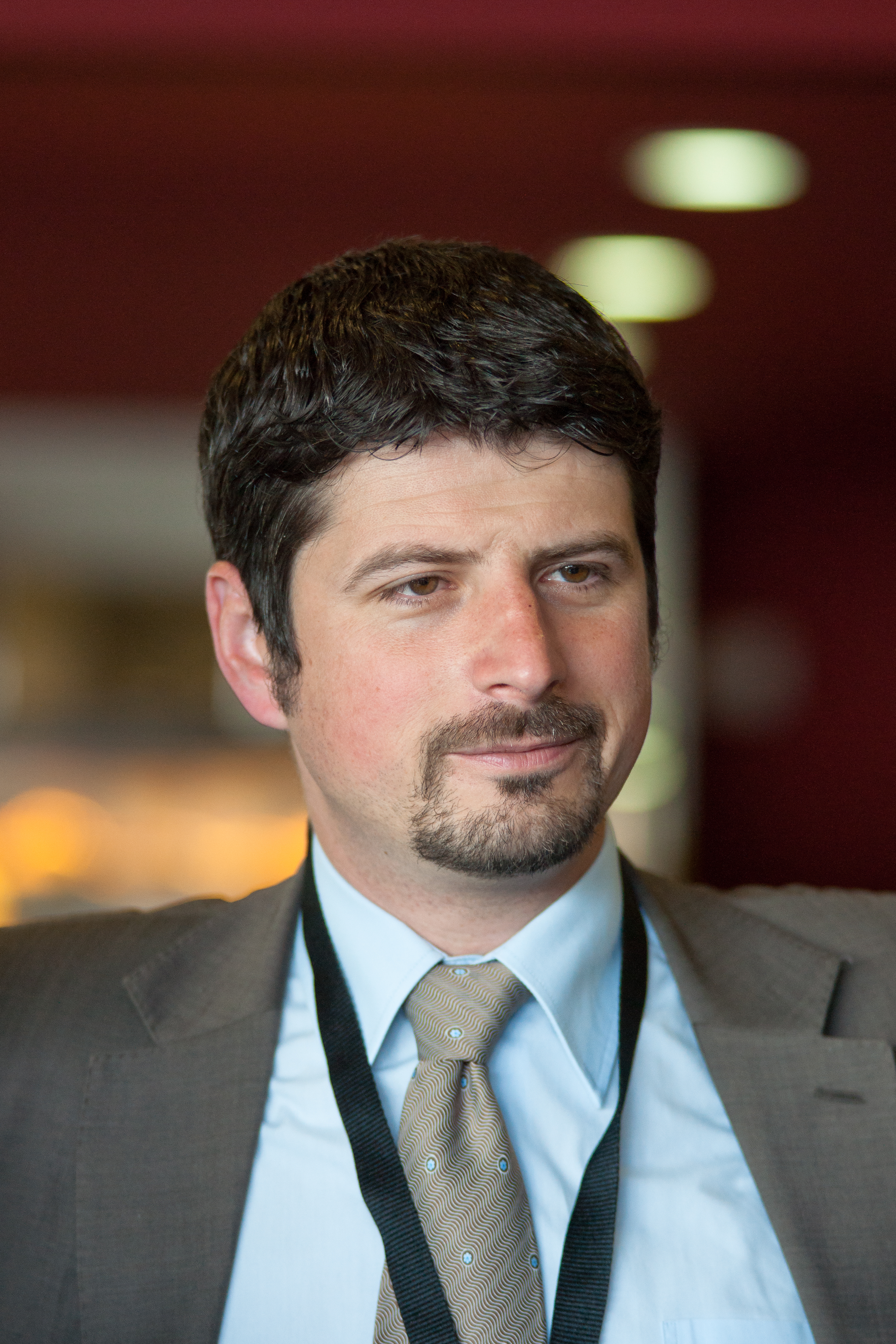 Yannick Buttet au forum des 100 en 2012.